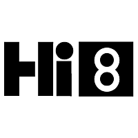 Hi8 logo